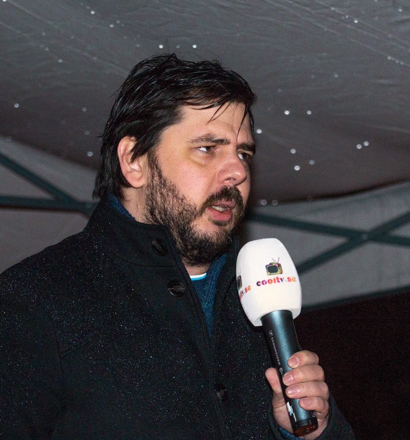 Chang Frick talar på Raoul Wallenbergs torg i Stockholm den 9 november 2019 till minne av Kristallnatten 1938. Arrangör: Vänskapsförbundet Sverige-Israel i Stockholm.